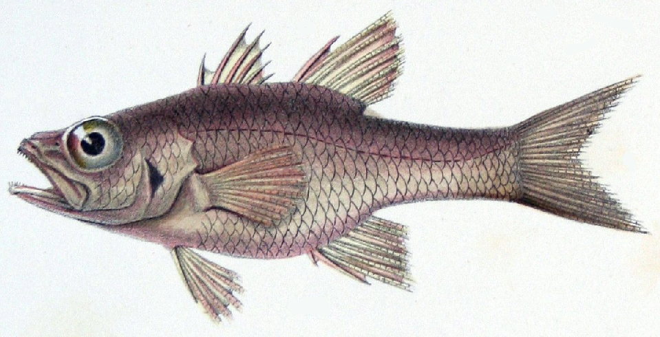 Apogon americanus - Expédition dans les parties centrales de l'Amérique du Sud, de Rio de Janeiro à Lima et de Lima au Para sous la direction du Comte Francis de Castelnau , 1856 (exemplaire de la bibliothèque patrimoniale de Gray (France))